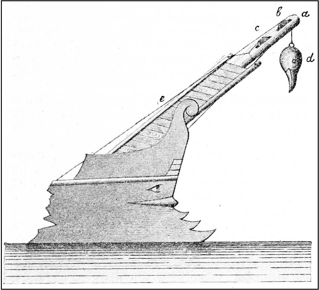 Данная картинка была использована в статье «Ворон» опубликованной в шестом томе «Военной энциклопедии», который был издан книгоиздательским товариществом Ивана Дмитриевича Сытина в 1912 году в столице Российской империи городе Санкт-Петербурге.